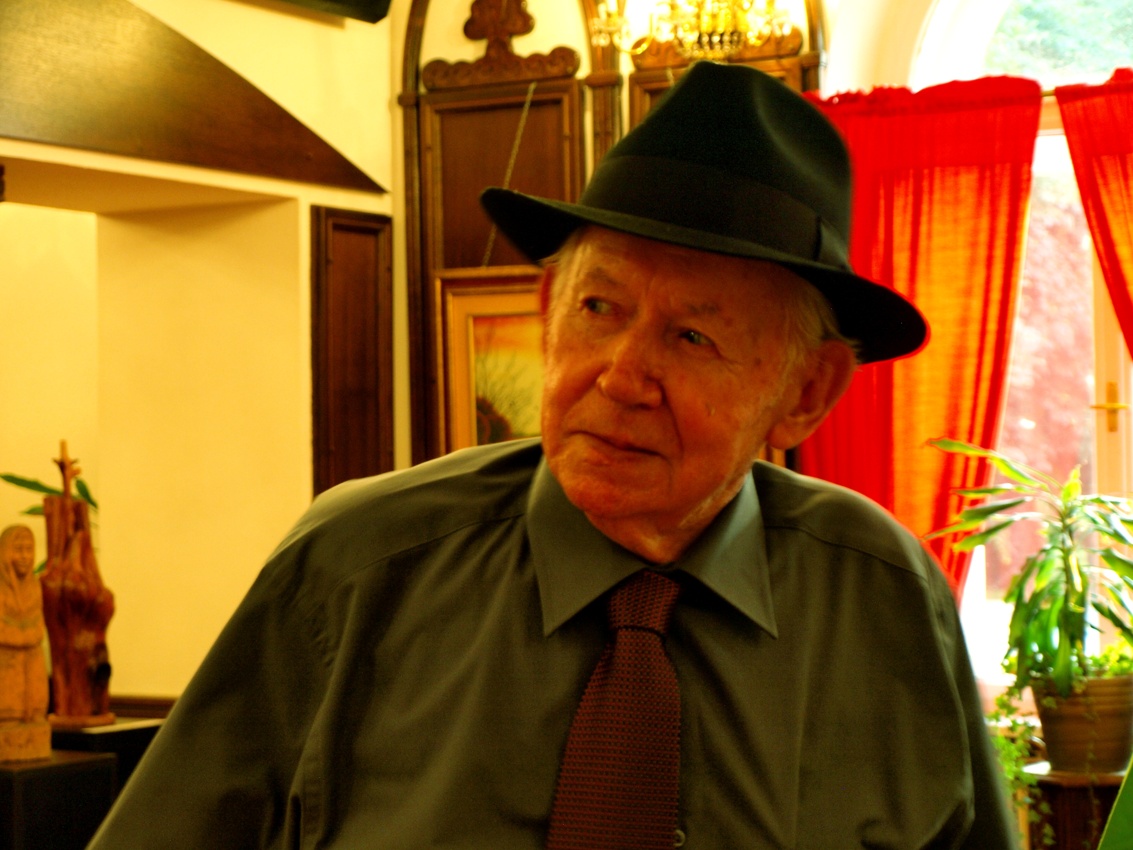 наивный художник Иван Веченай, 2010 г.